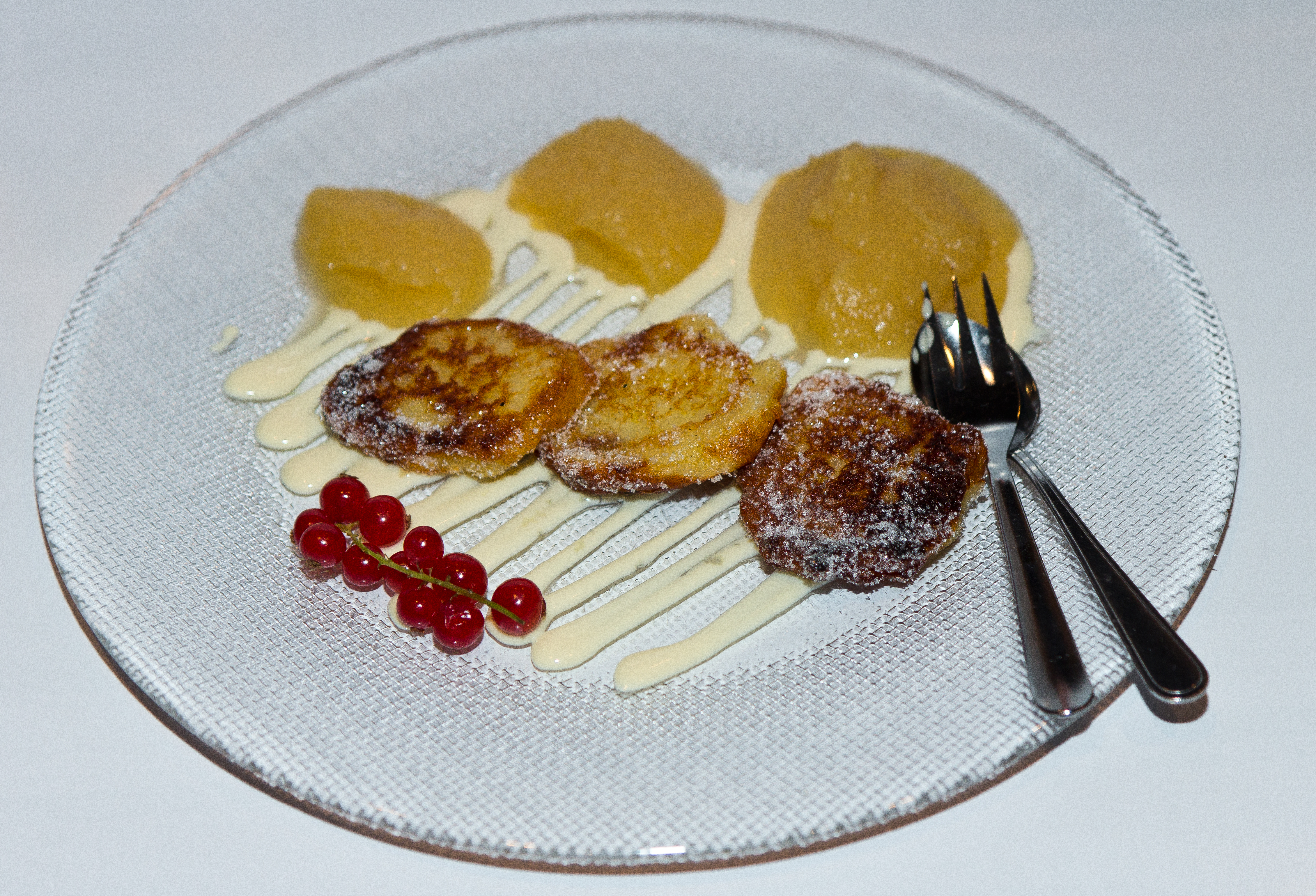 Sächsische Quarkkäulchen mit Apfelmus, Vanillesauce und Zucker. Wikipedia im Landtag – Sachsen 17. bis 18. Dezember 2013 in DresdenDieses Foto wurde im Rahmen des Projektes „Wikipedia im Landtag“ erstellt. Fragen zur Nachnutzung Wenn Sie Fragen zur Nachnutzung dieses Bildes haben, können Sie sich jederzeit gern an wenden